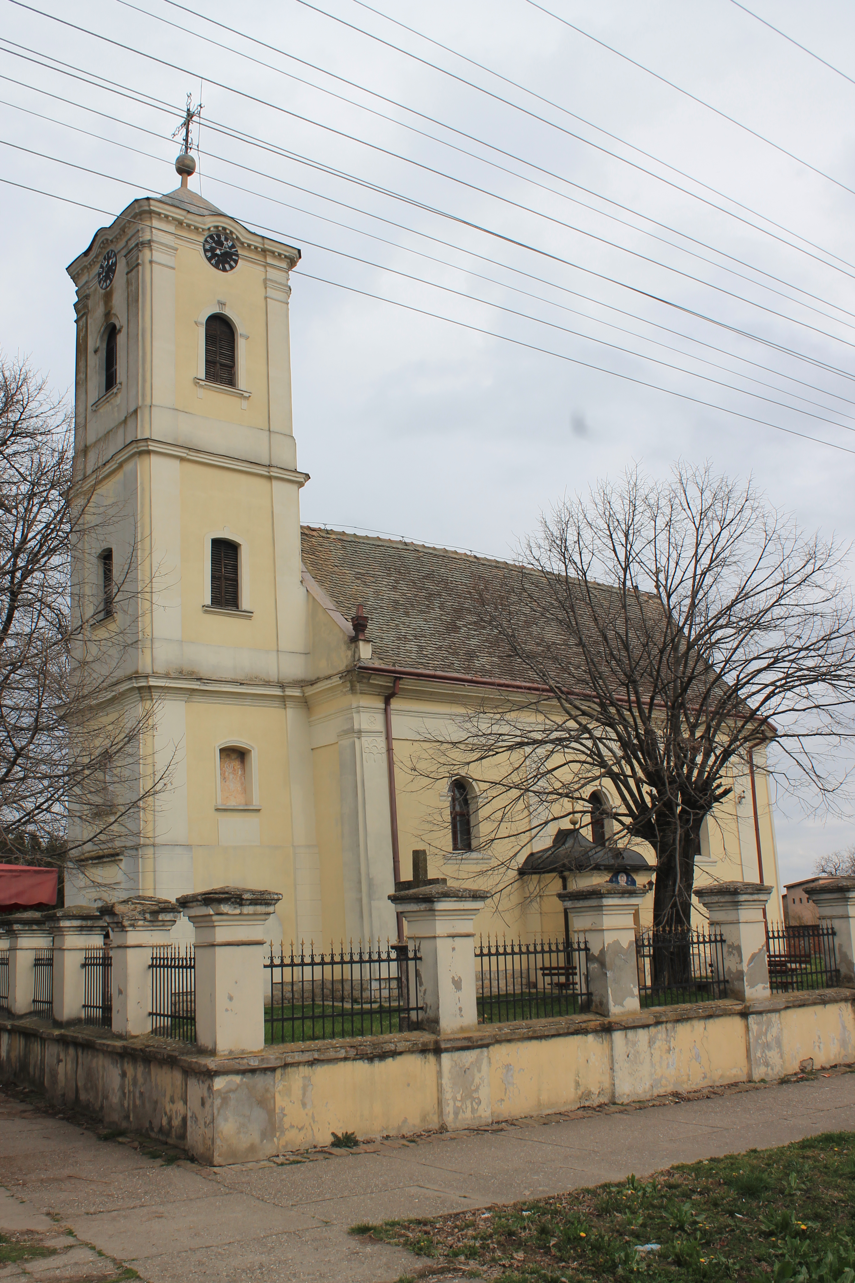 Crkva Sv. Gavrila, Veliki Radinci